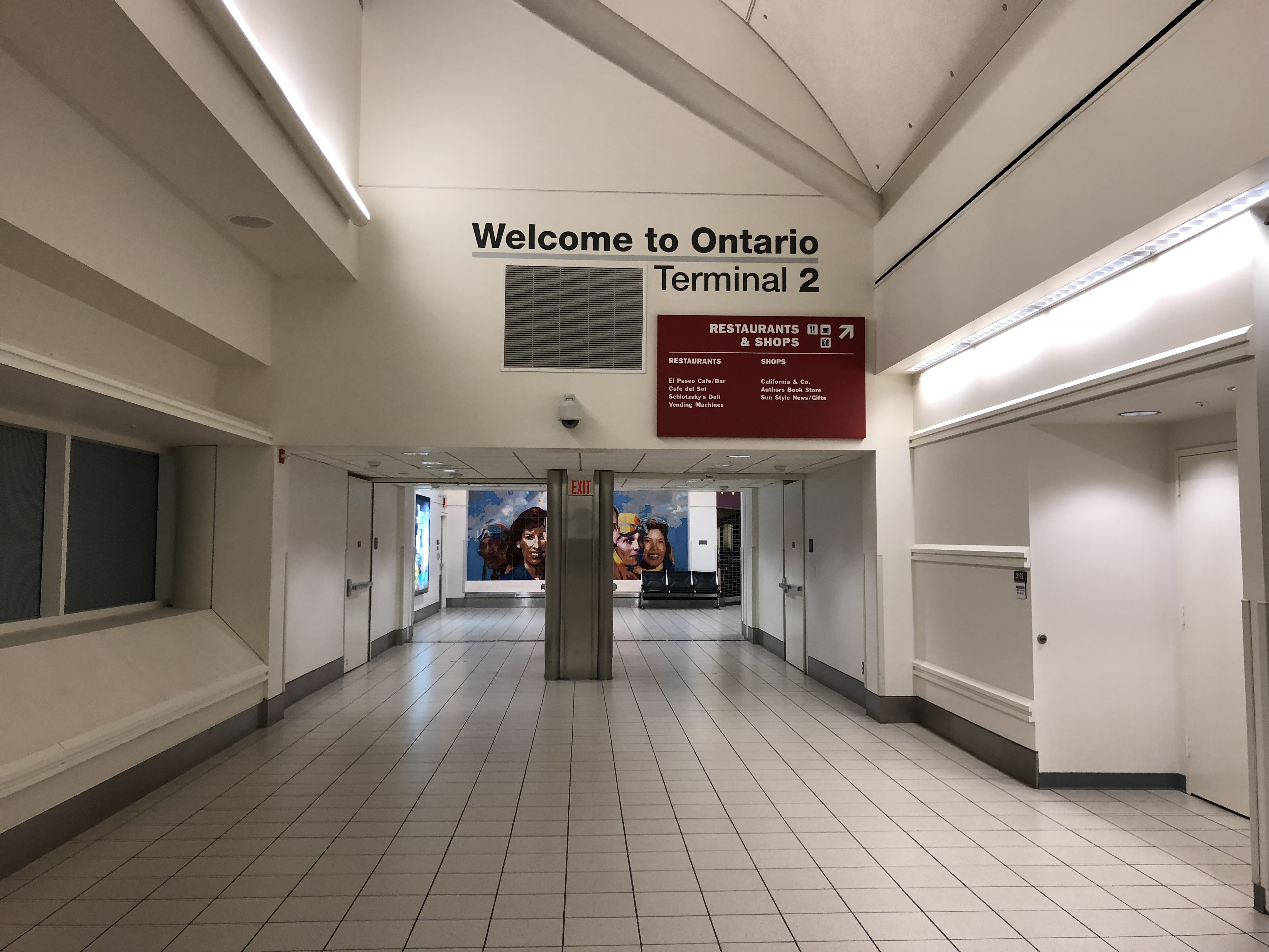 Terminal 2 del Aeropuerto Internacional de Ontario.